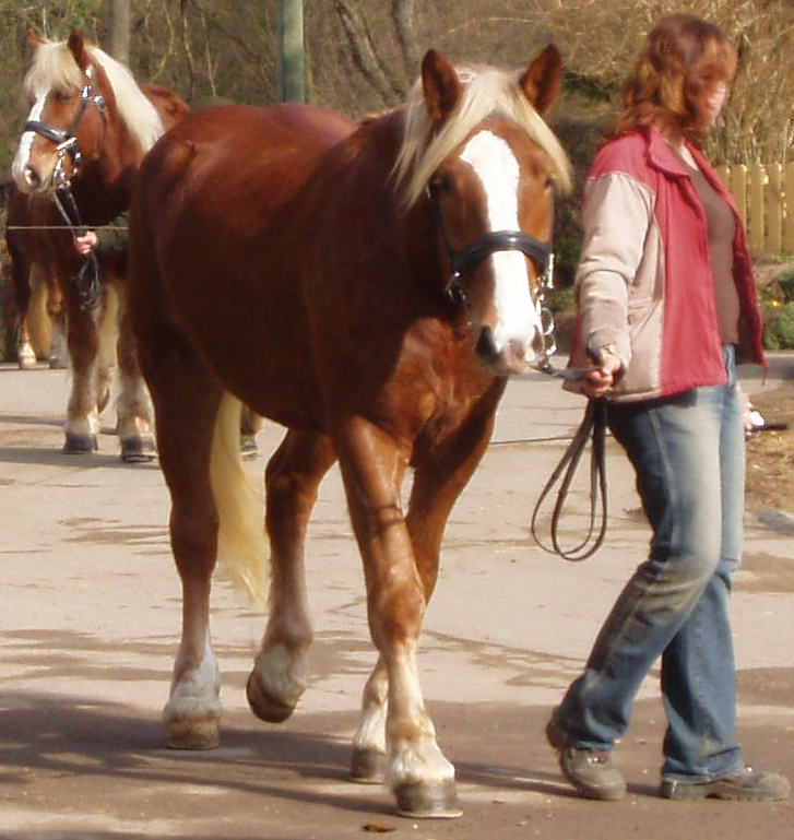 Schwarzwälder Kaltblut auf dem Heilbronner Pferdemarkt